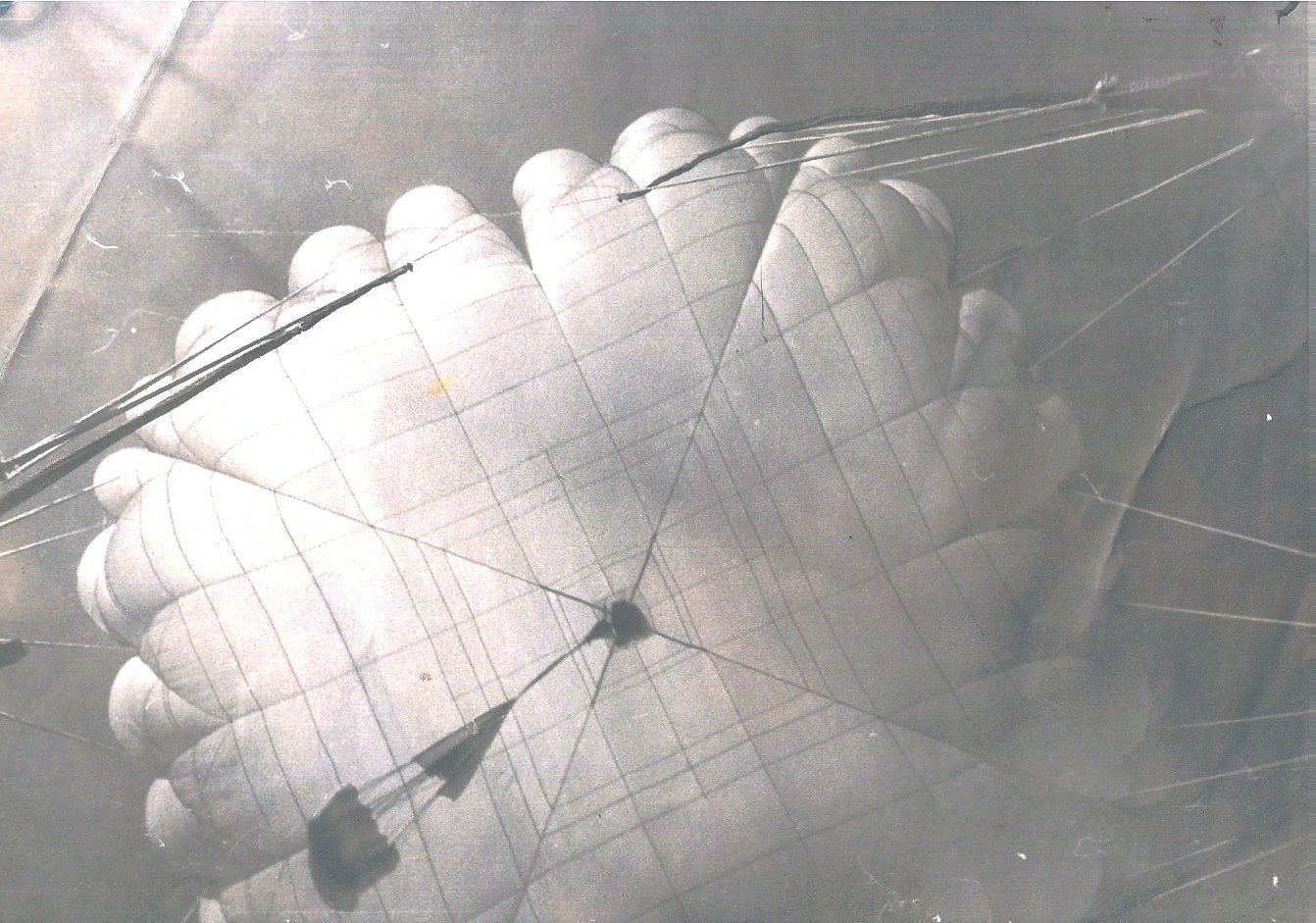 Снимок купола парашюта Д-6-4 после раскрытия. Хорошо просматривается квадратная форма купола в горизонтальной проекции.